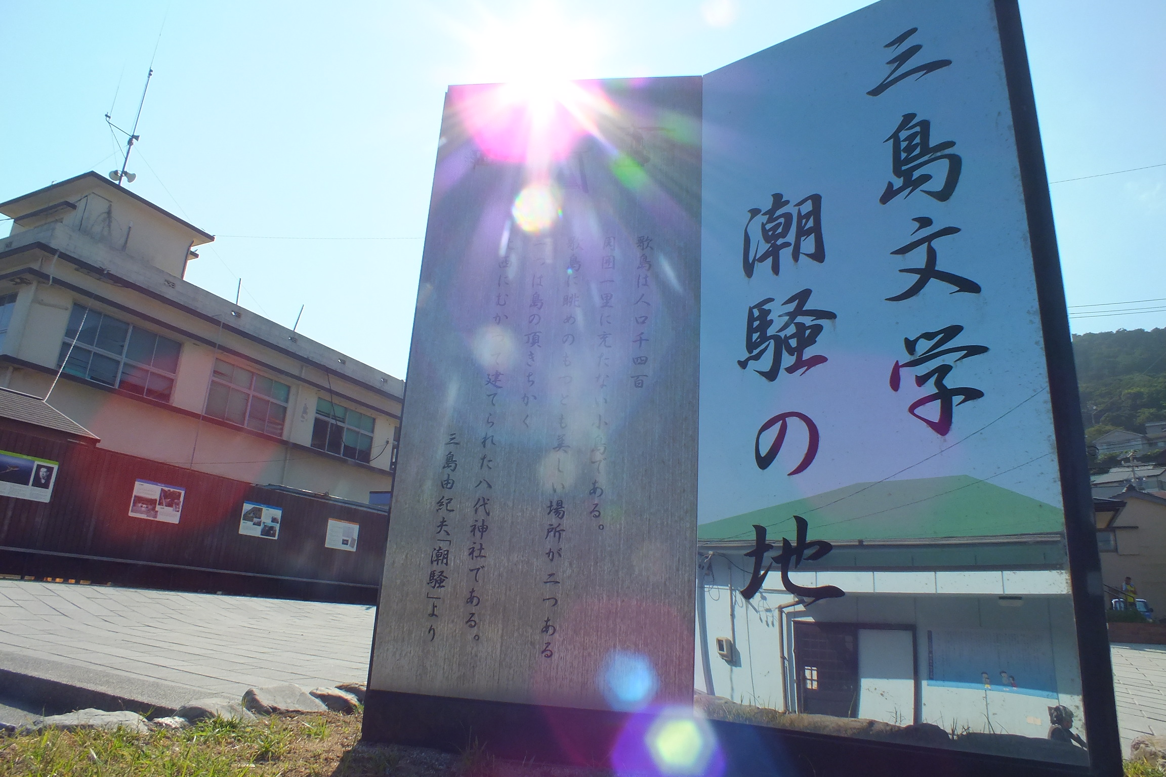 2016-08-05 Port of Kami Island (Mie) 三島文学の碑